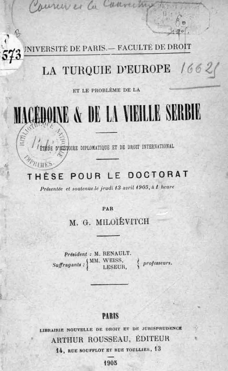 Корица на книгата на Милош Милоевич "Европейска Турция"